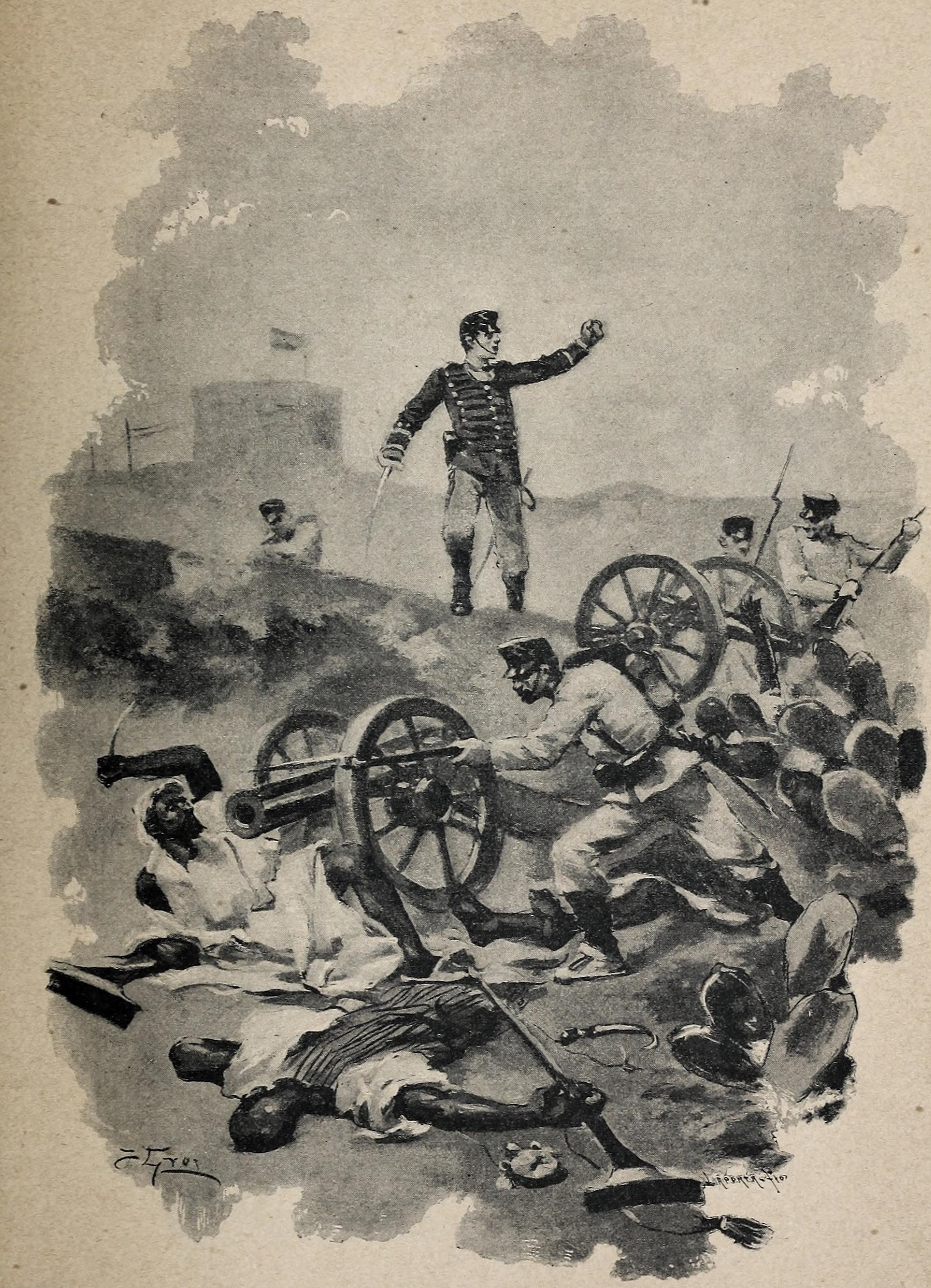 Acción heroica del Teniente Primo de Rivera. Dibujo de Gros, tomado de un croquis remitido desde Melilla por Don E. B. M..